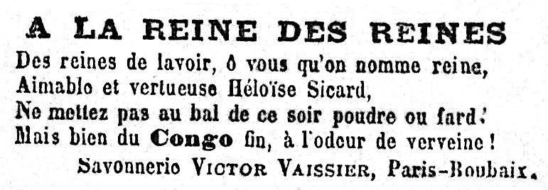 Détournement de la Mi-Carême 1891 avec sa Reine des Reines, à des fins publicitaires. A noter que Louise Sicard est ici baptisée par erreur Héloïse Sicard.